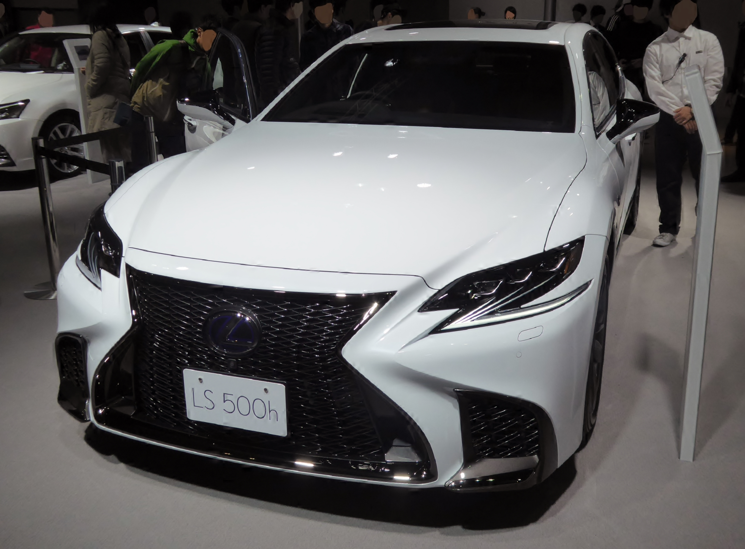 大阪モーターショー2017に於いてDAA-GVF50-AEVQH型レクサス・LS500h"F SPORT"を撮影。